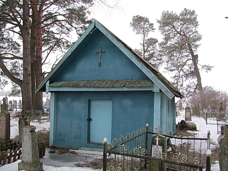 Яськавічы. Капліца